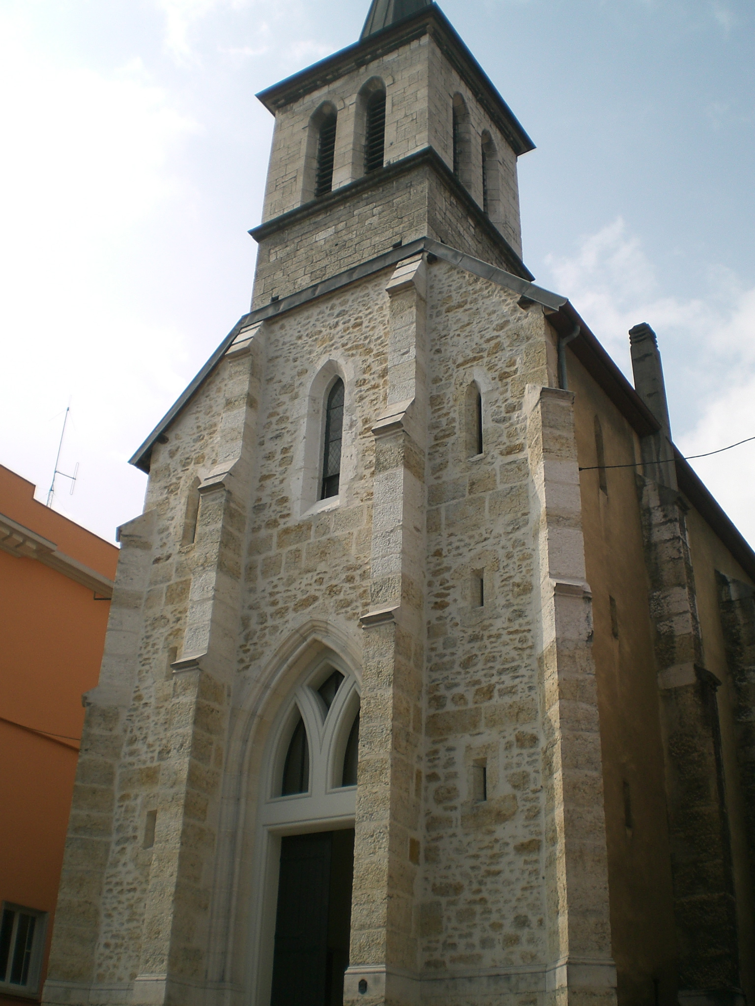 eglise notre dame de l'assomption à bellegarde-sur-Valserine